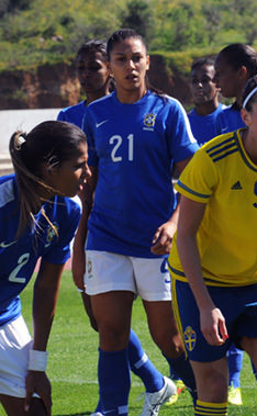 a_59_5932